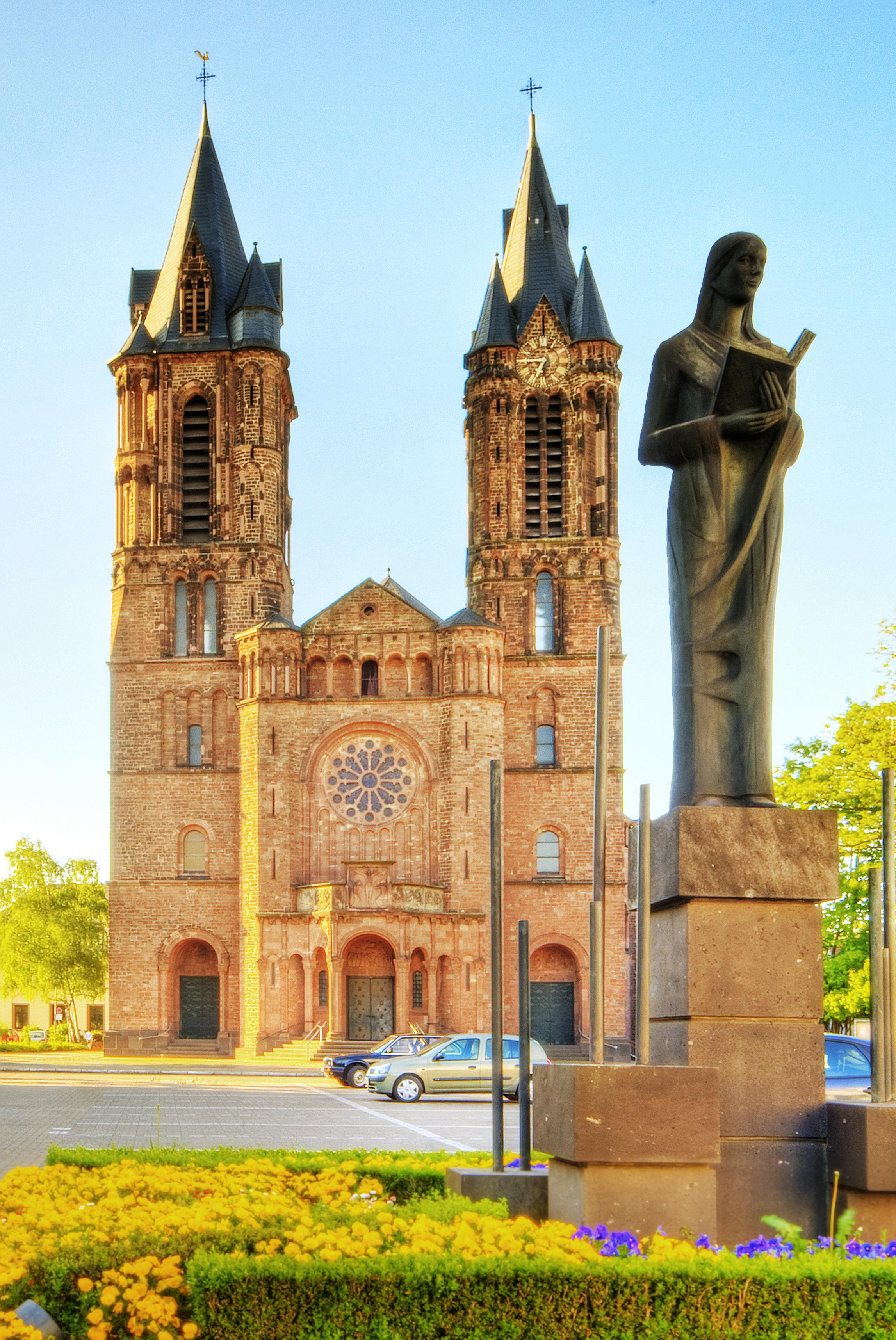 Saardom